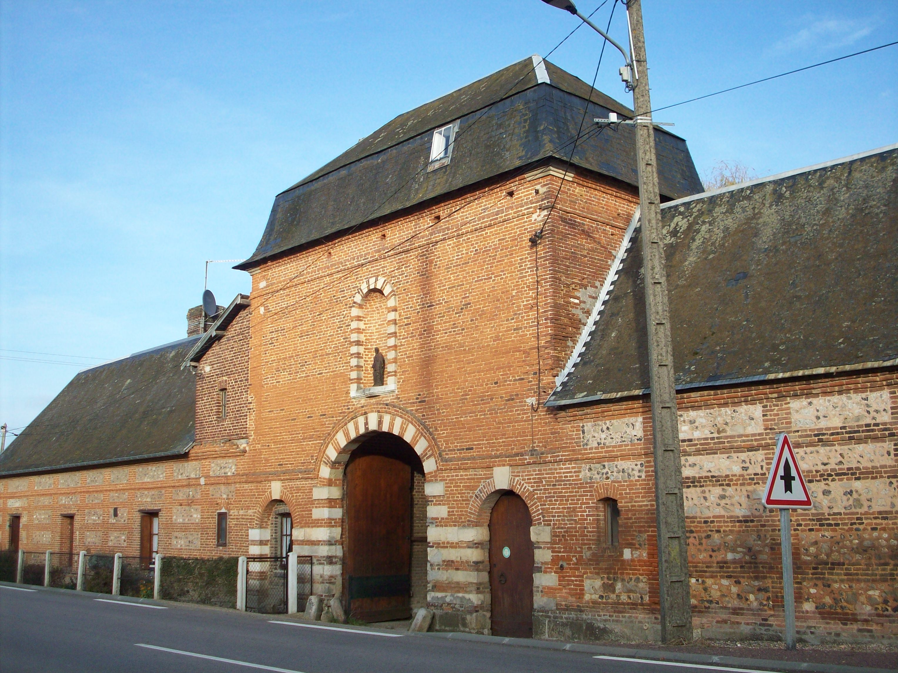 Porterie, construite à partir de 1712, de l'ancienne abbaye de l'Isle-Dieu, à Perruel.